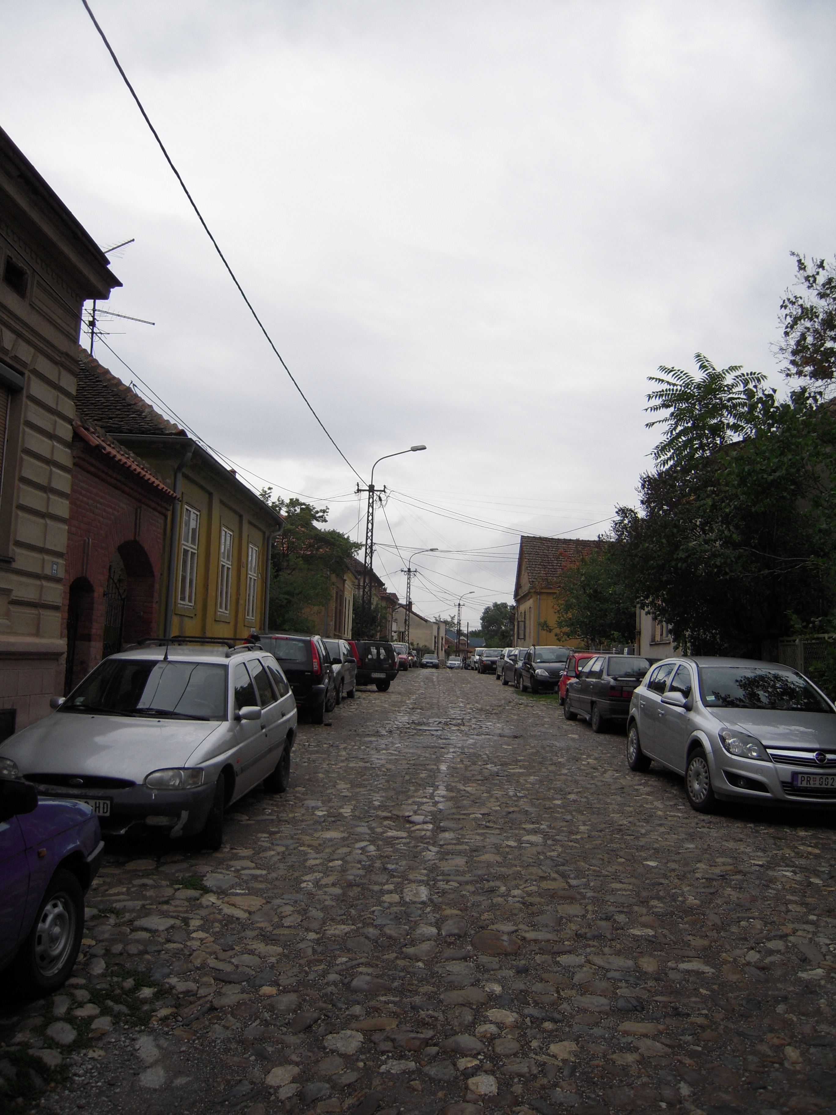 Грчки шор у Крушевцу